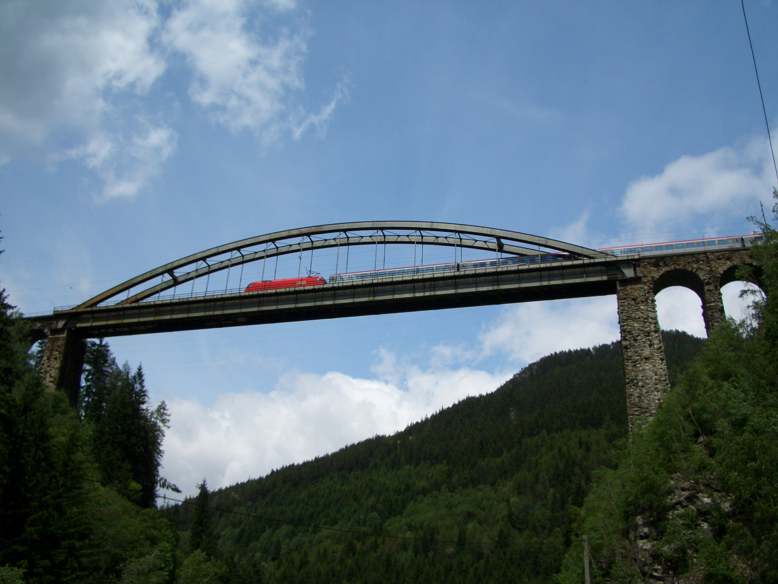 de: Trisannabrücke mit ÖBB EC 662 nach Feldkirch. en: Trisannabridge with ÖBB EC 662 to Feldkirch.